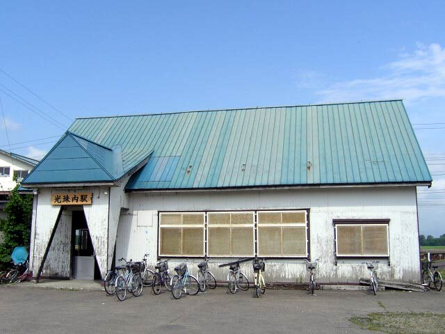 Koshunai Station in Hakodate Line, Japan